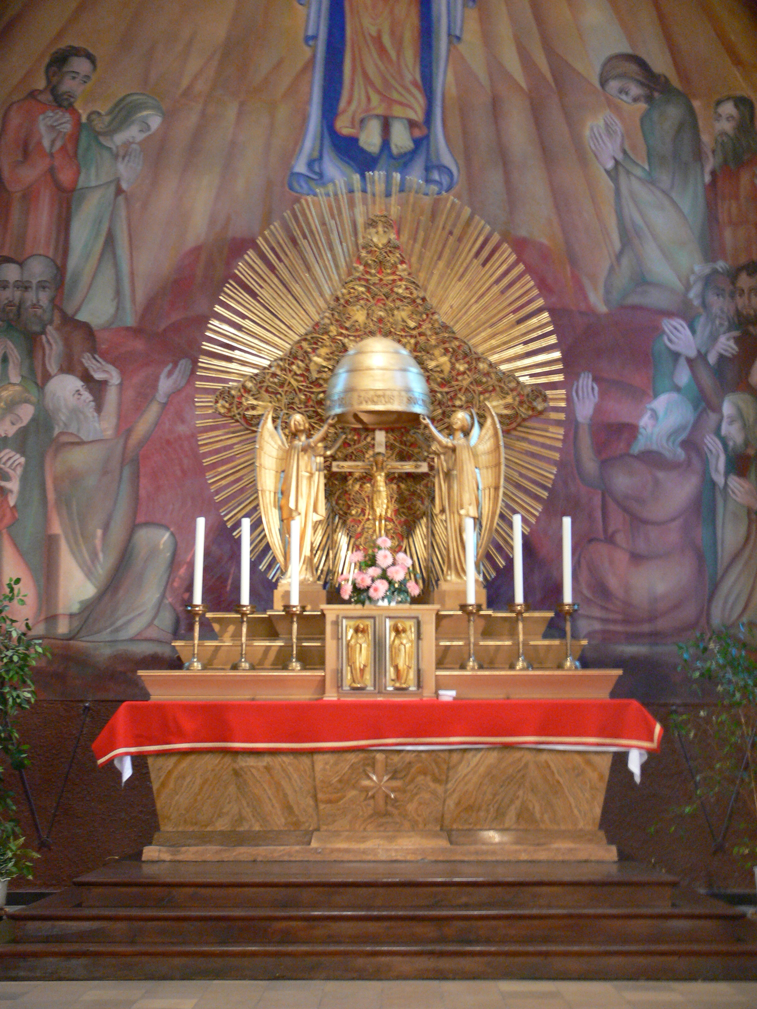 Baienfurt, Landkreis Ravensburg Katholische Pfarrkirche Mariä Himmelfahrt Hochaltar von Prof. Theodor Schnell d. J.